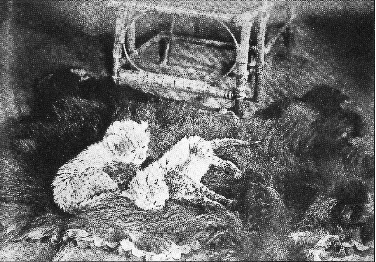 'Cheetah Cubs